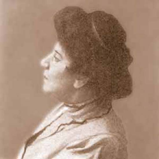 Мари́я (Ми́на) Льво́вна Диллон (1858—1932) — первая в России женщина — профессиональный скульптор.